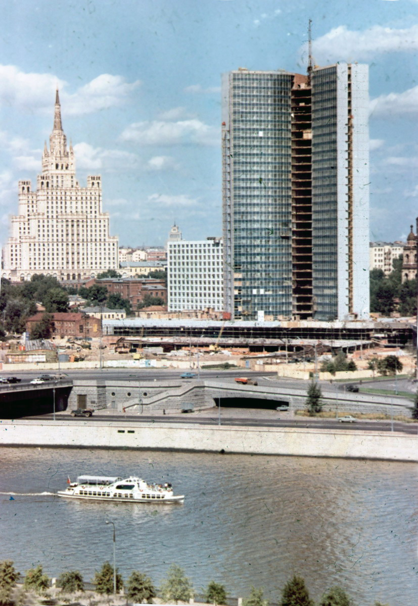 Москва 1970